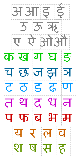 Devanagari alfabet Sanskriet